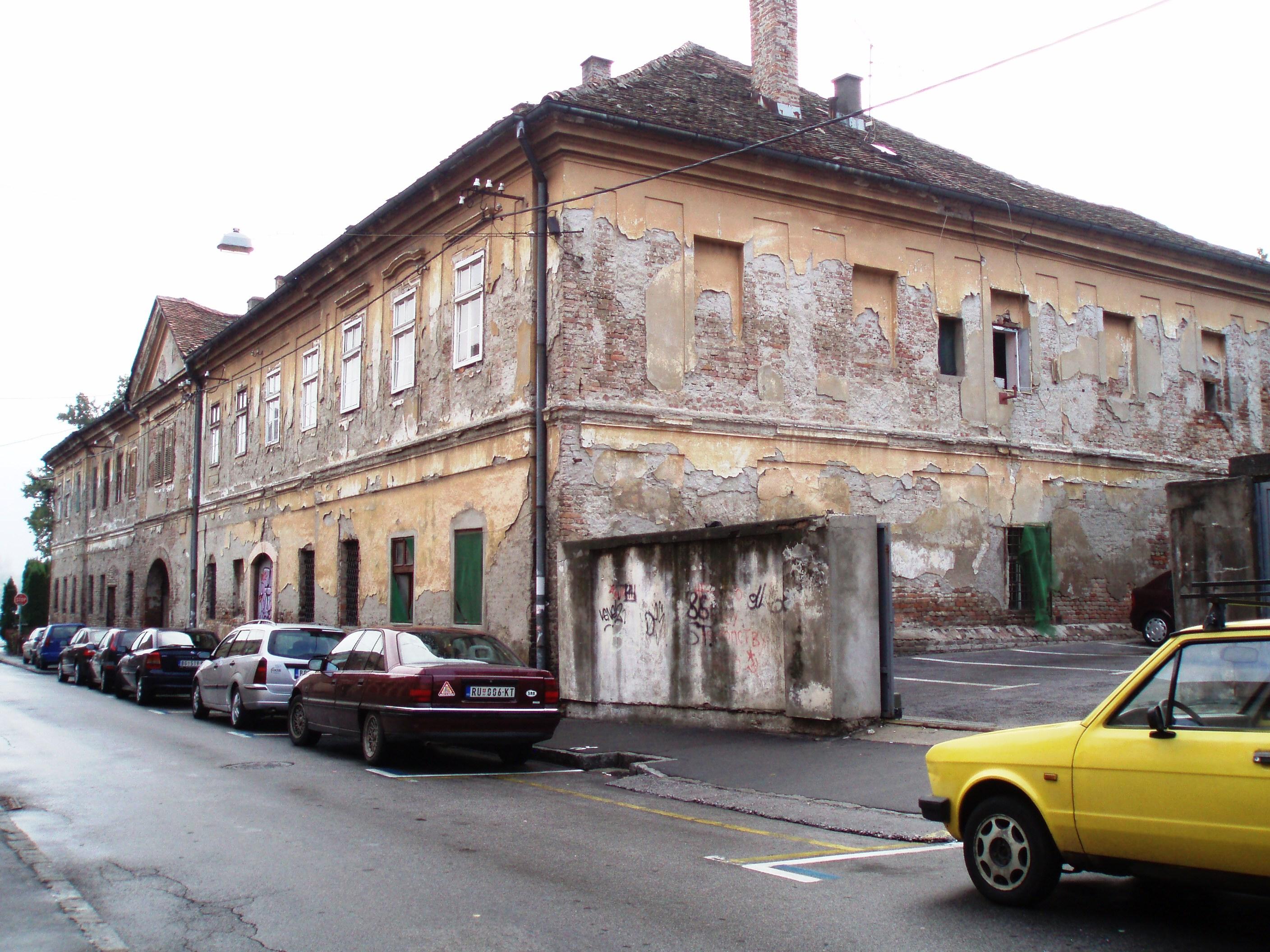 Carinarnica u Zemunu, Zmaj Jovina 26, autor fotografije: Nicolo